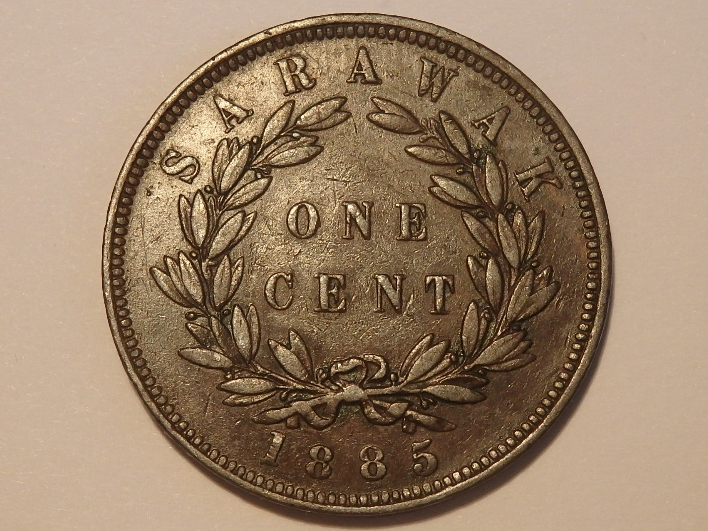 Wertseite des Onecent Sarawaks von 1885, Schön/Cartier Nr. 7